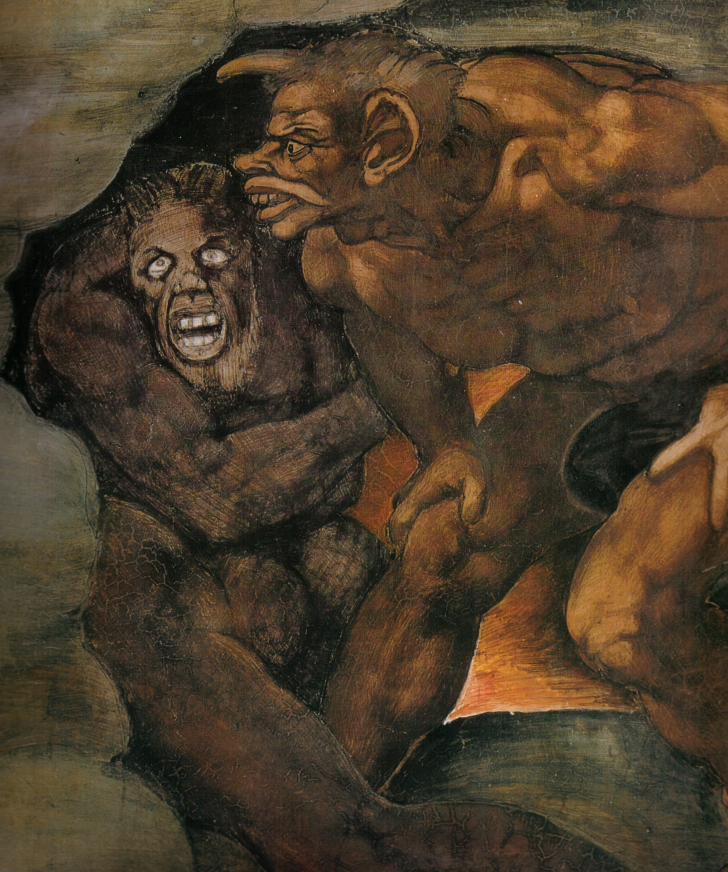 MICHELANGELO Buonarroti Last Judgment Fresco, 1370 x 1220 cm Cappella Sistina, Vatican